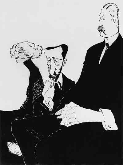 Gippius, Merejkovsky, Filisofov. Caricature by Re-Mi (Nikolai Remizov)